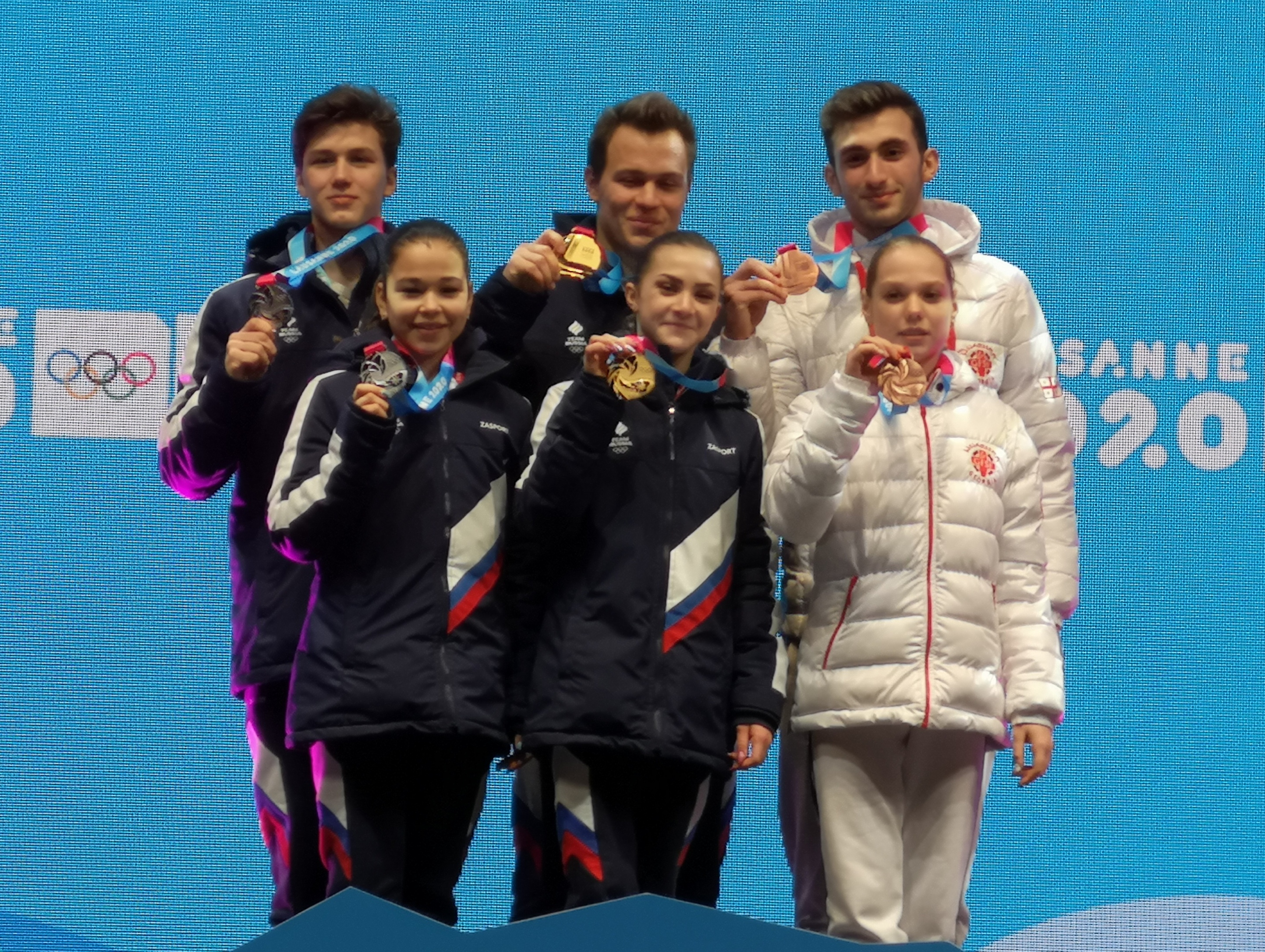 Le podium de l'épreuve de patinage artistique couples des JOJ de Lausanne 2020 : Apollinariia Panfilova / Dmitry Rylov (RUS), Diana Mukhametzianova / Ilya Mironov (RUS) et Alina Butaeva / Luka Berulava (GEO).